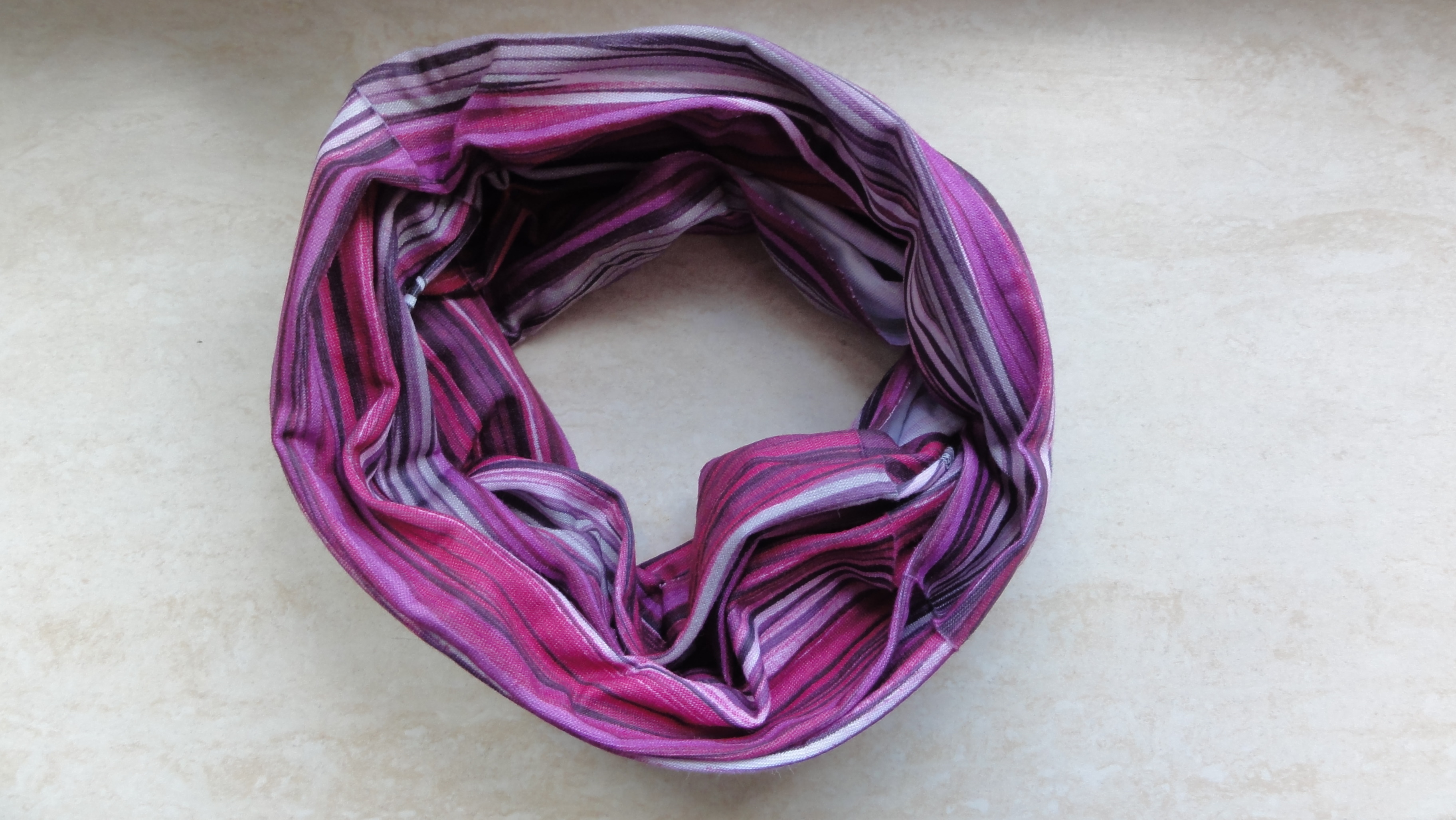 Motif: Schlauchtuch, beerenfarben (Hersteller: Buff)